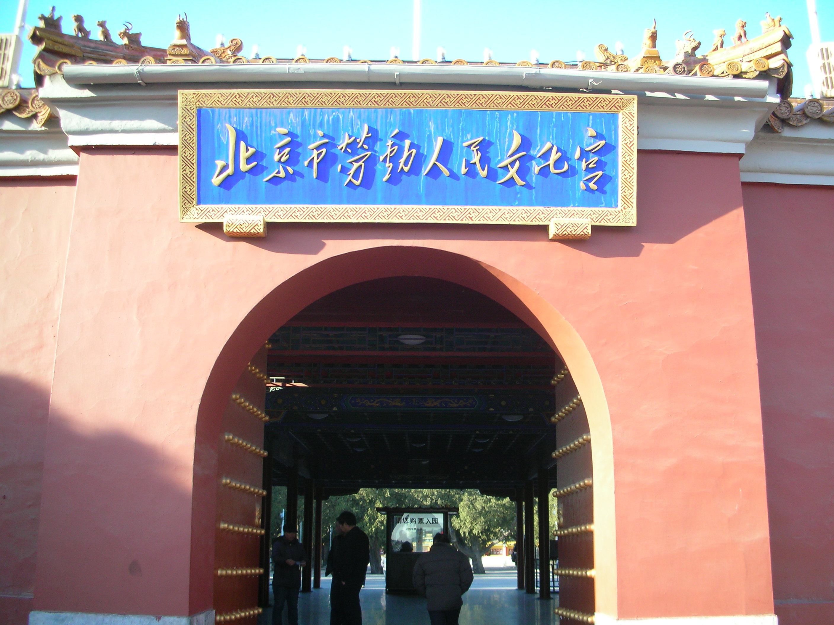 北京太庙